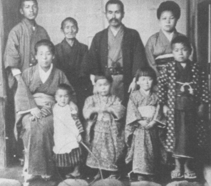 Kikue Okanoue (岡上菊栄, Japanese, *1867, †1947)